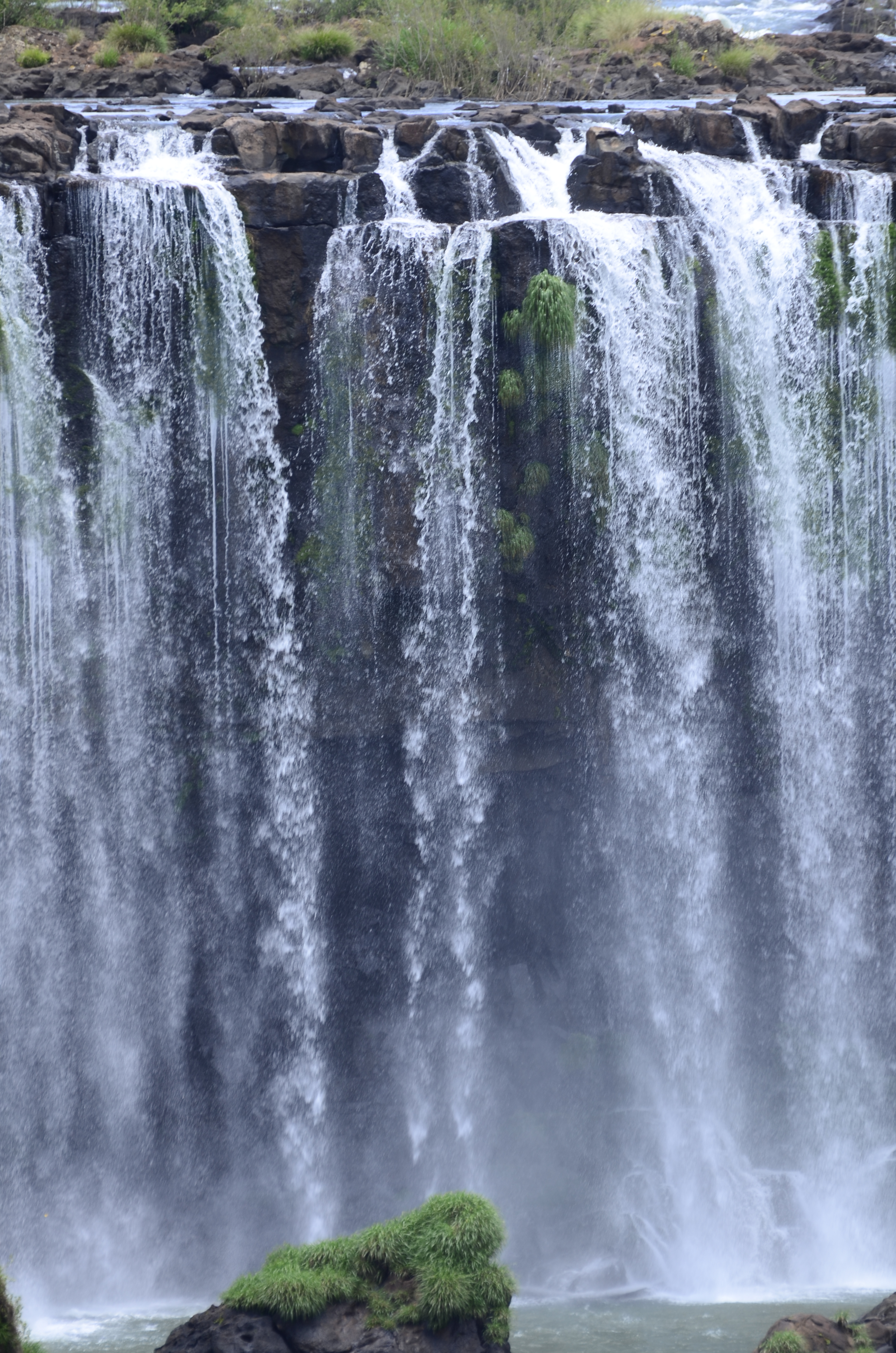 Cataratas do Iguaçu (em espanhol: Cataratas del Iguazú) é um conjunto de cerca de 275 quedas de água no Rio Iguaçu (na Bacia hidrográfica do rio Paraná), localizada entre o Parque Nacional do Iguaçu, Paraná, no Brasil 20%, e o Parque Nacional Iguazú em Misiones, na Argentina 80%, na fronteira entre os dois países. A área total de ambos os parques nacionais, correspondem a 250 mil hectares de floresta subtropical e é considerada Patrimônio Natural da Humanidade.